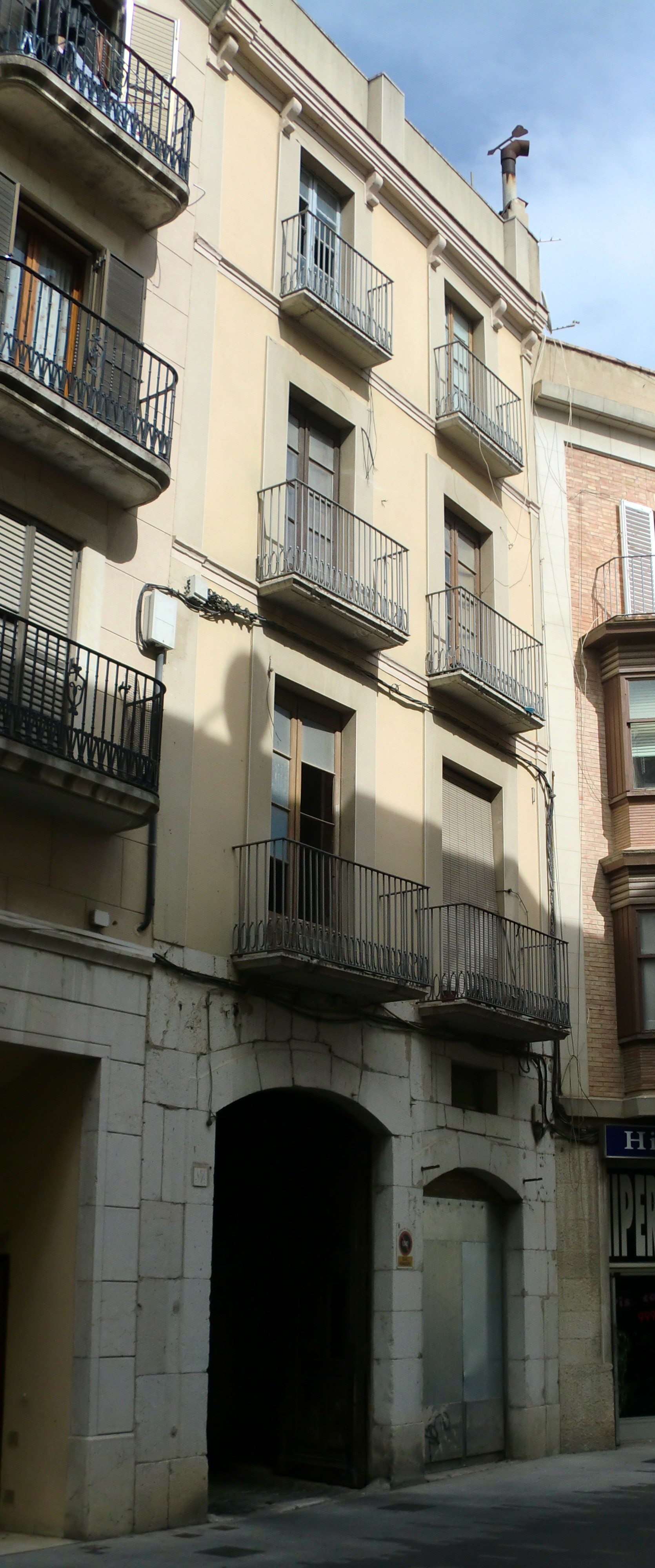 Casa al carrer Muralla, 17 (Figueres)